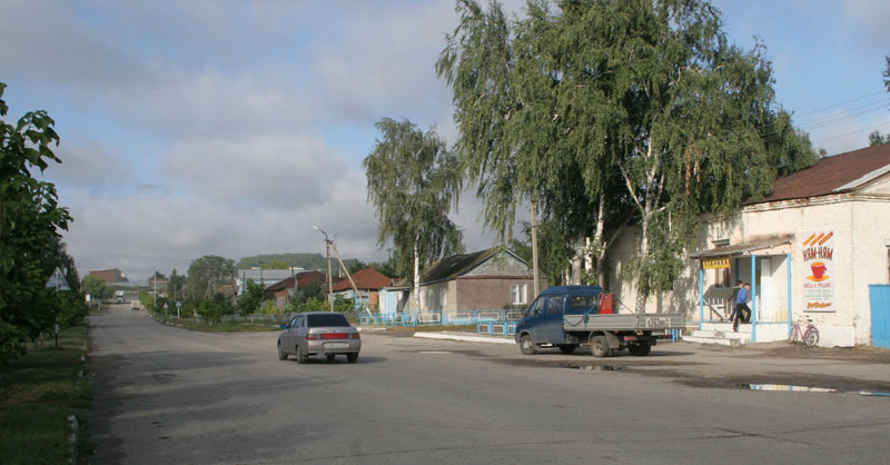 Улица в селе Балтай Балтайского района Саратовской области